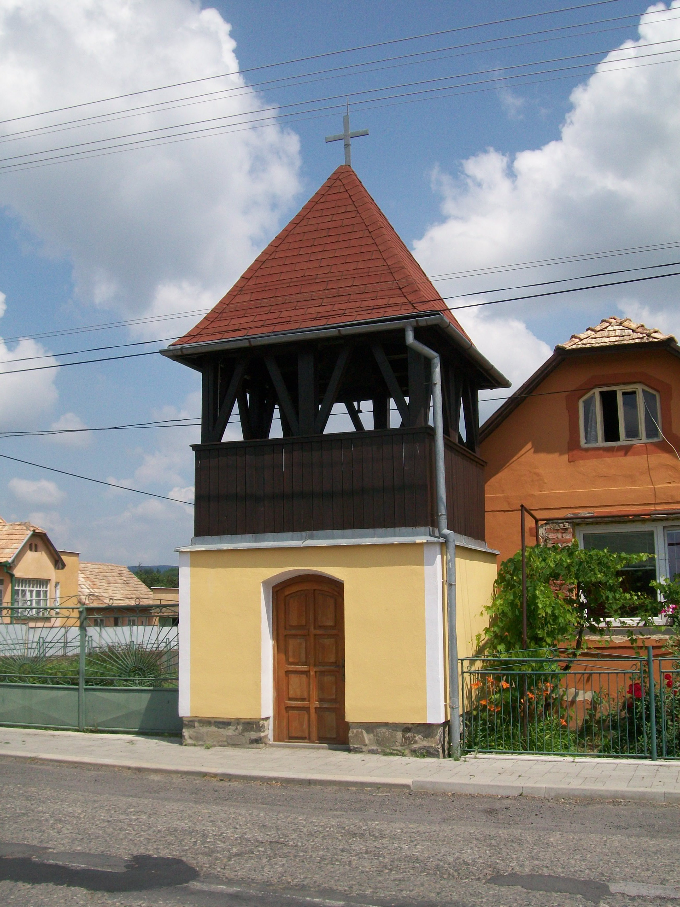 Zvonica obce Čamovce